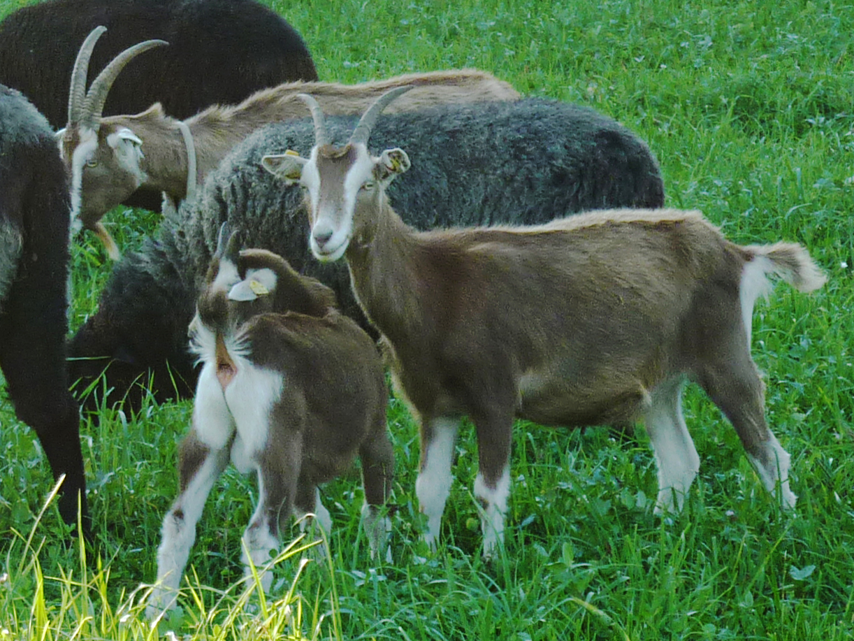 Thüringerwald-Ziegen im Freilandmuseum Domäne Dahlem, Berlin, Deutschland.